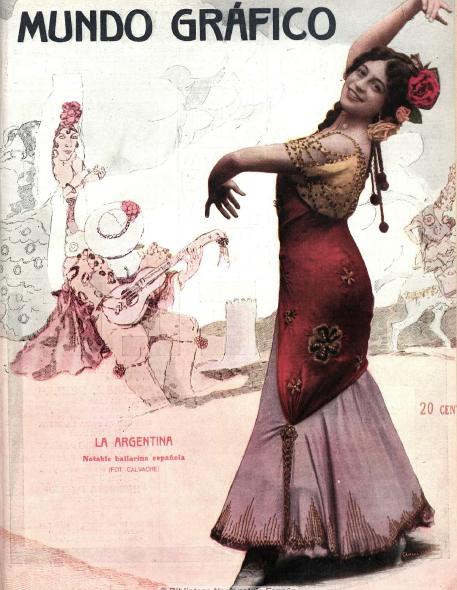 Portada de la revista Mundo Gráfico que muestra a la bailarina hispanoargentina Antonia Mercé La Argentina